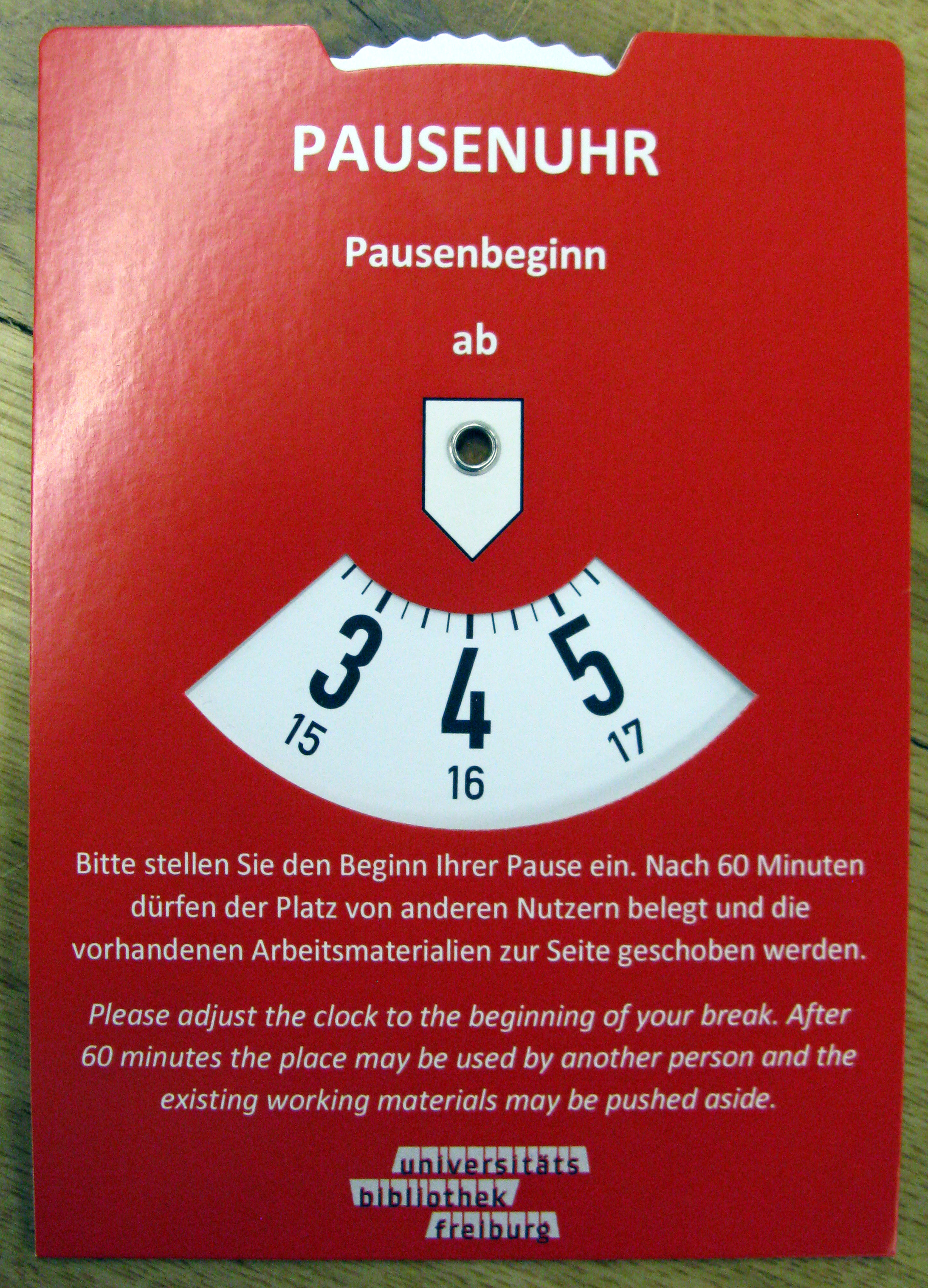 Pausenuhr der Universitätsbibliothek Freiburg, Vorderseite